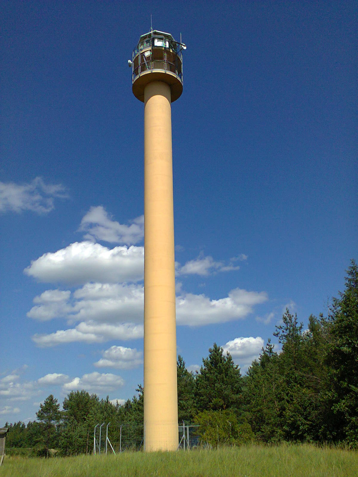 Klon -wieża przeciwpożarowa (powiat szczycieński)